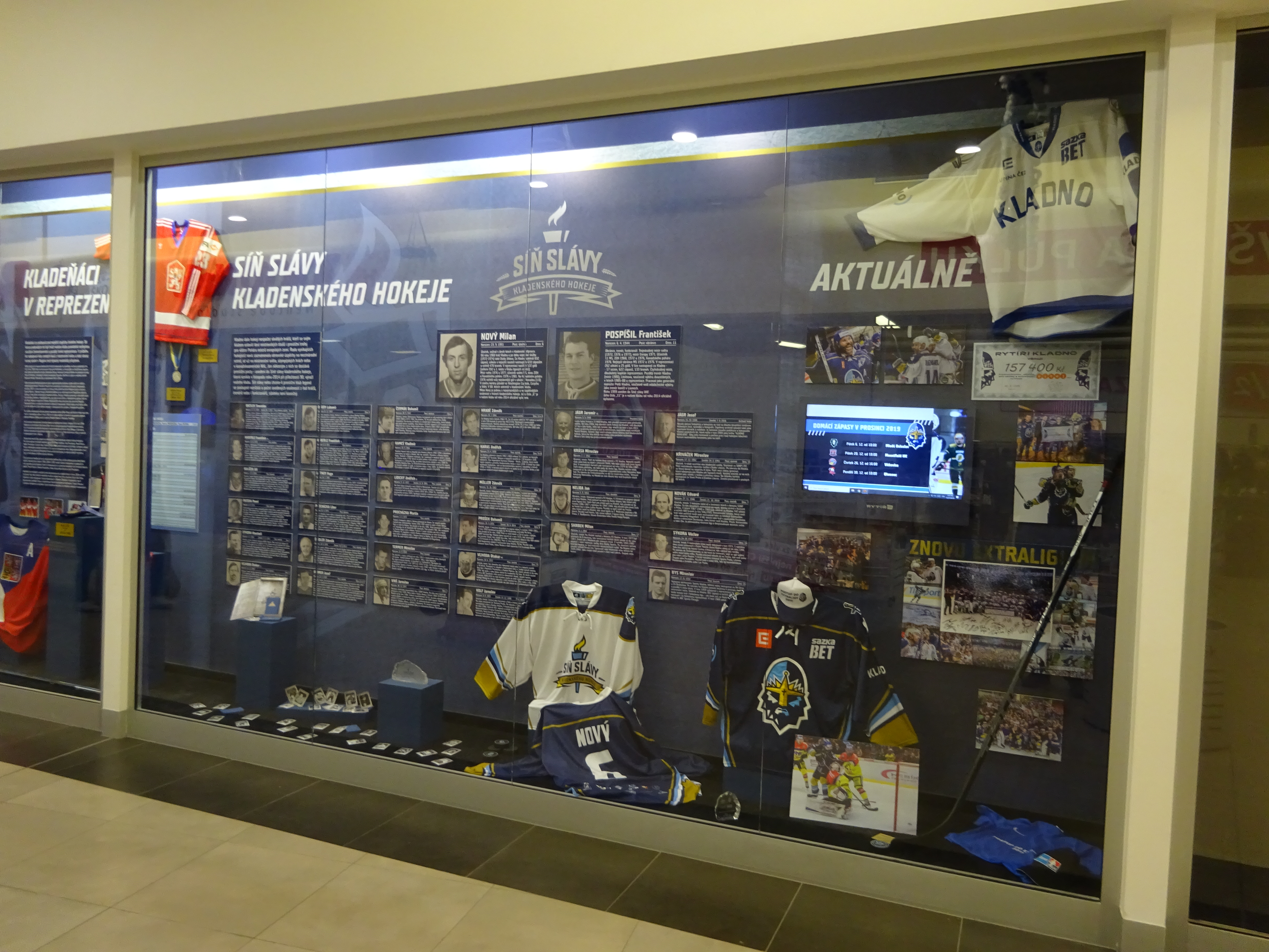 Kladno, OC Oáza, vitrína Síně slávy